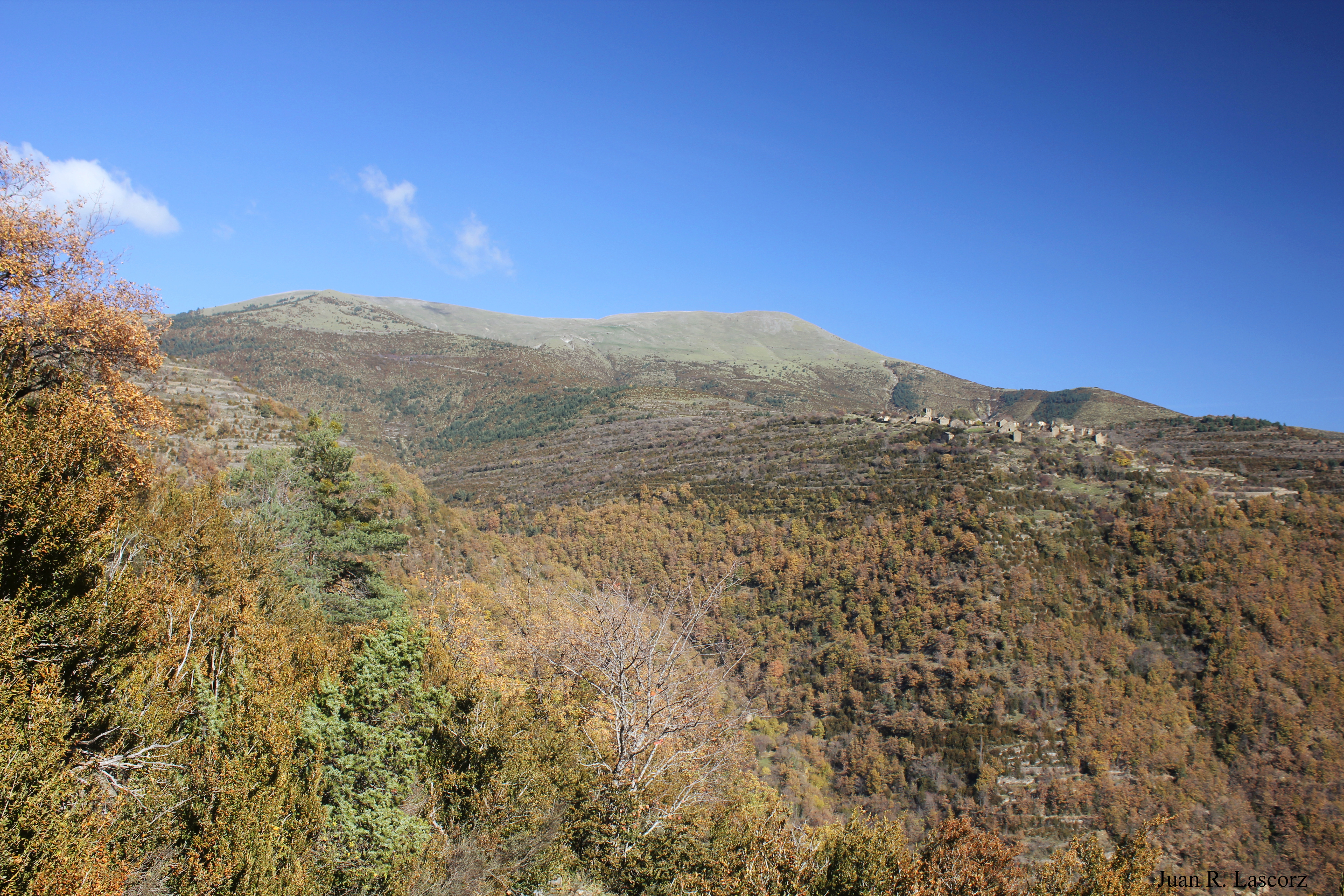 Aragonés: O macizo d'a Manchoya y Escartín coronando lo suyo sarrato, en as garras.